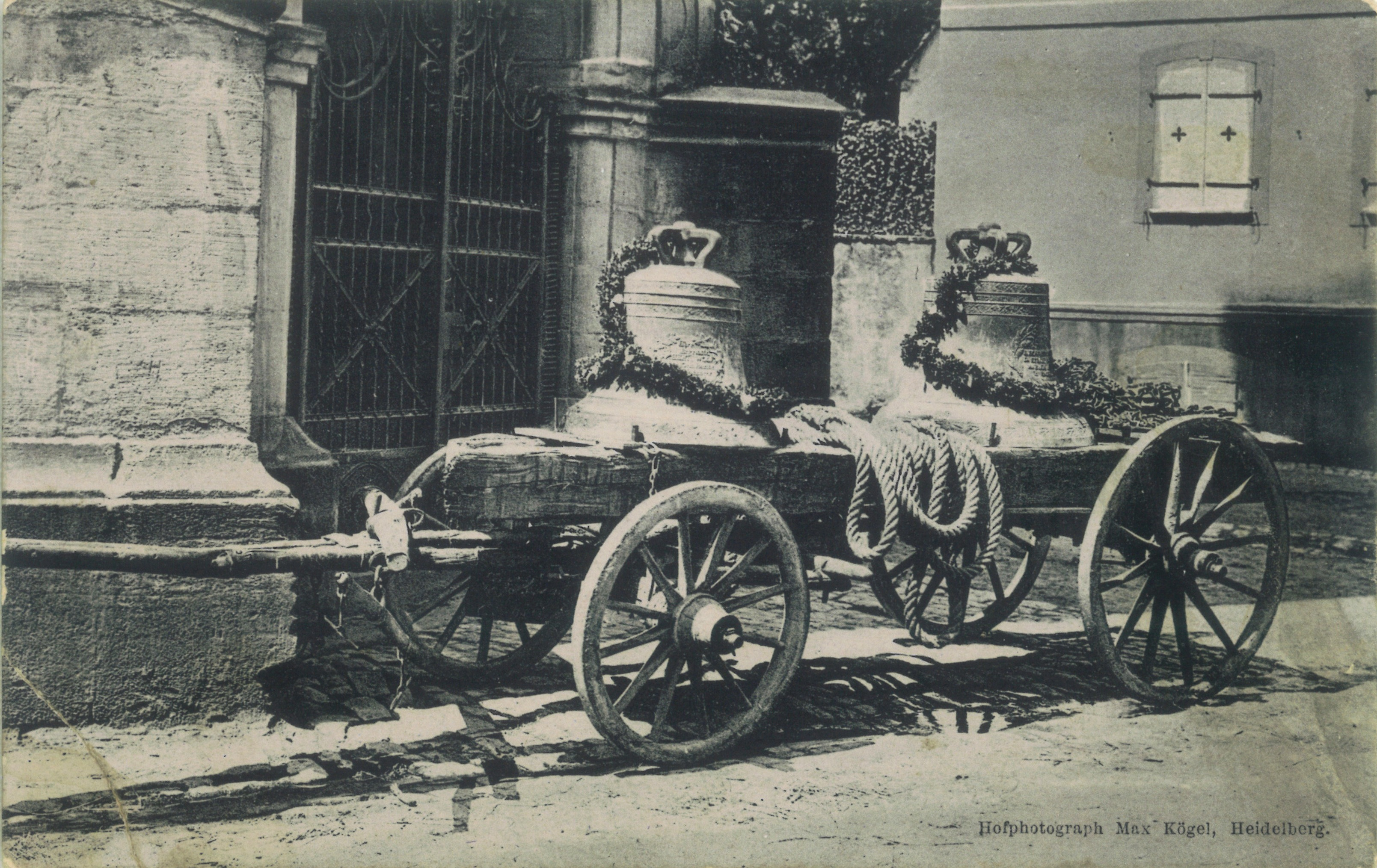 Die Glocken der evangelischen Kirche in Eschelbronn aus den Jahren 1833 und 1863 werden zur Einschmelzung für die Kriegsrüstung abgegeben.